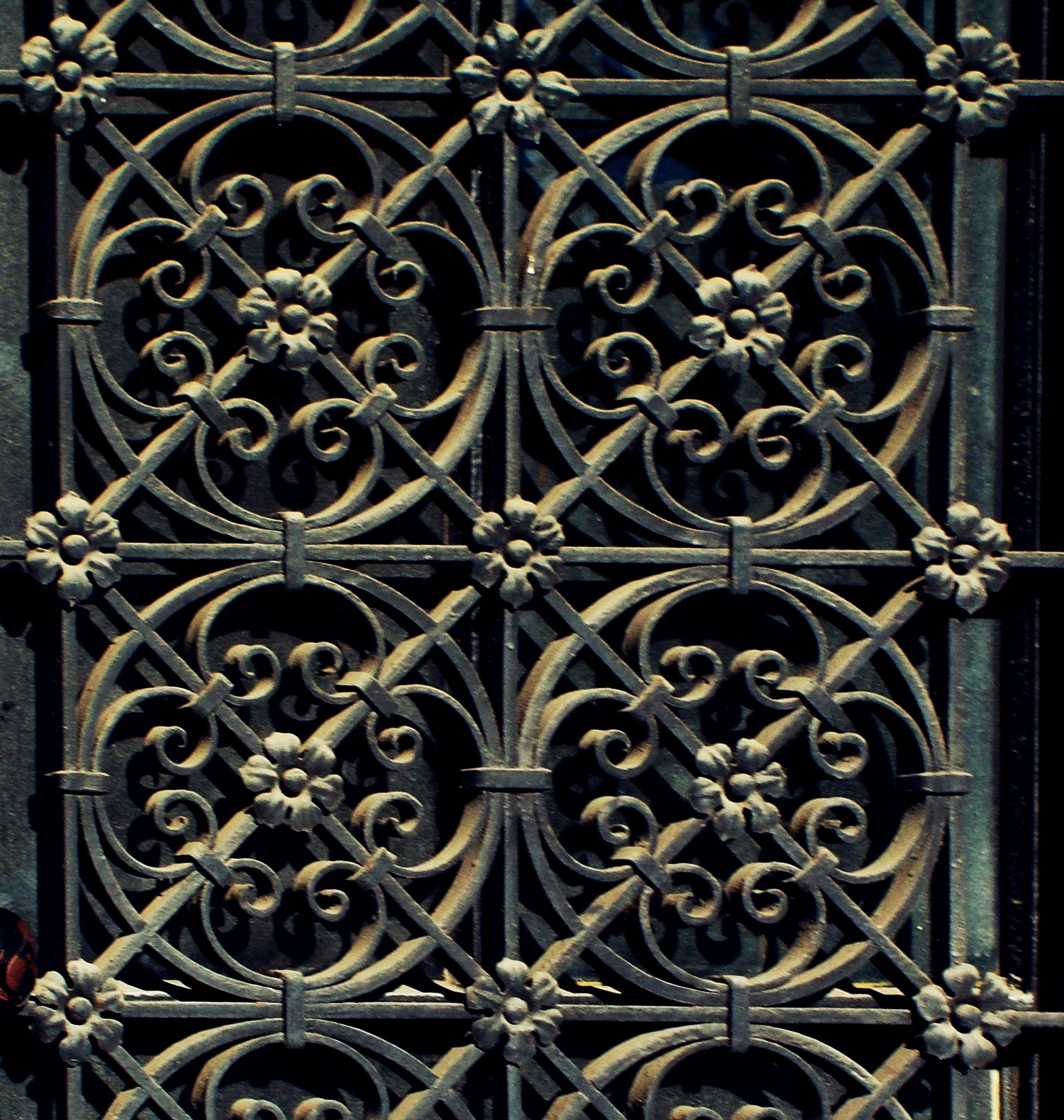 Kovácsoltvas a veszprémi megyeházán